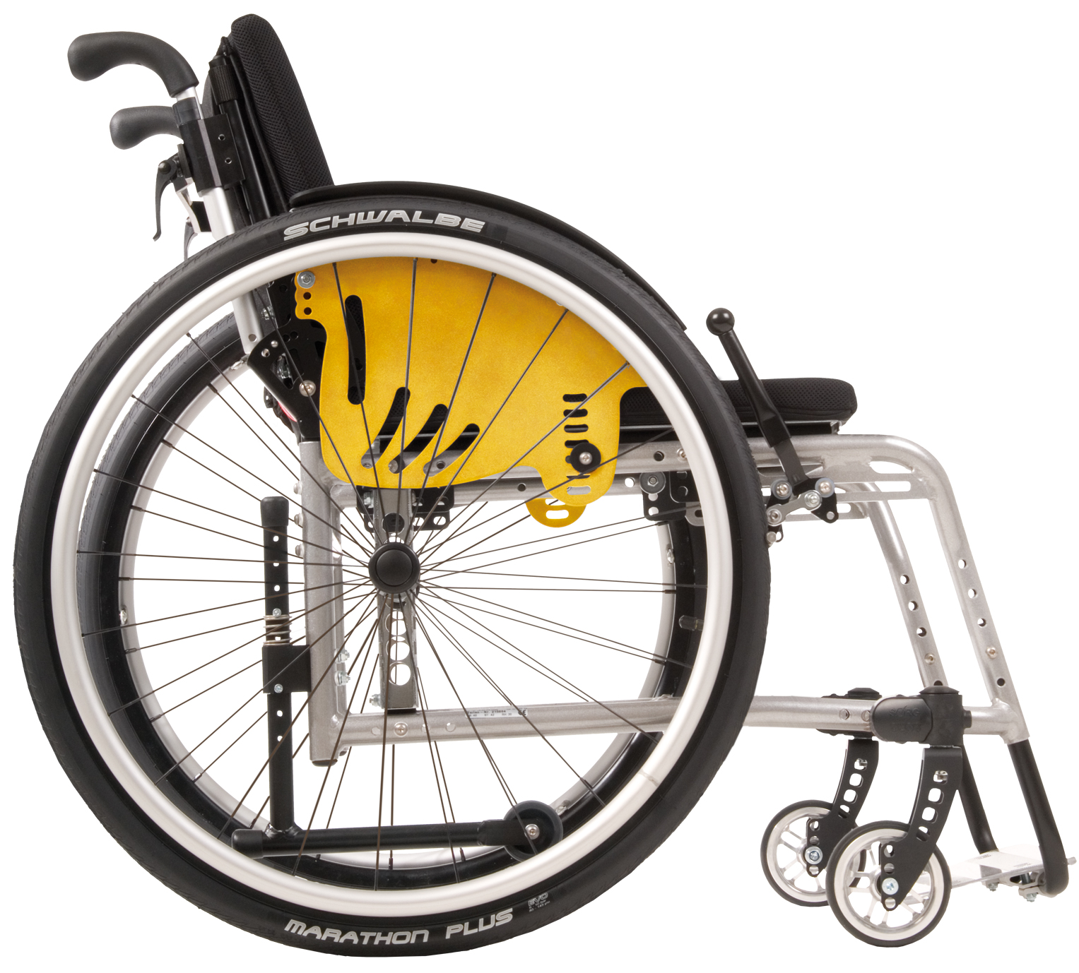 Vector: ultraleichter, mitwachsender Adaptiv-Rollstuhl mit starrem V-Rahmen